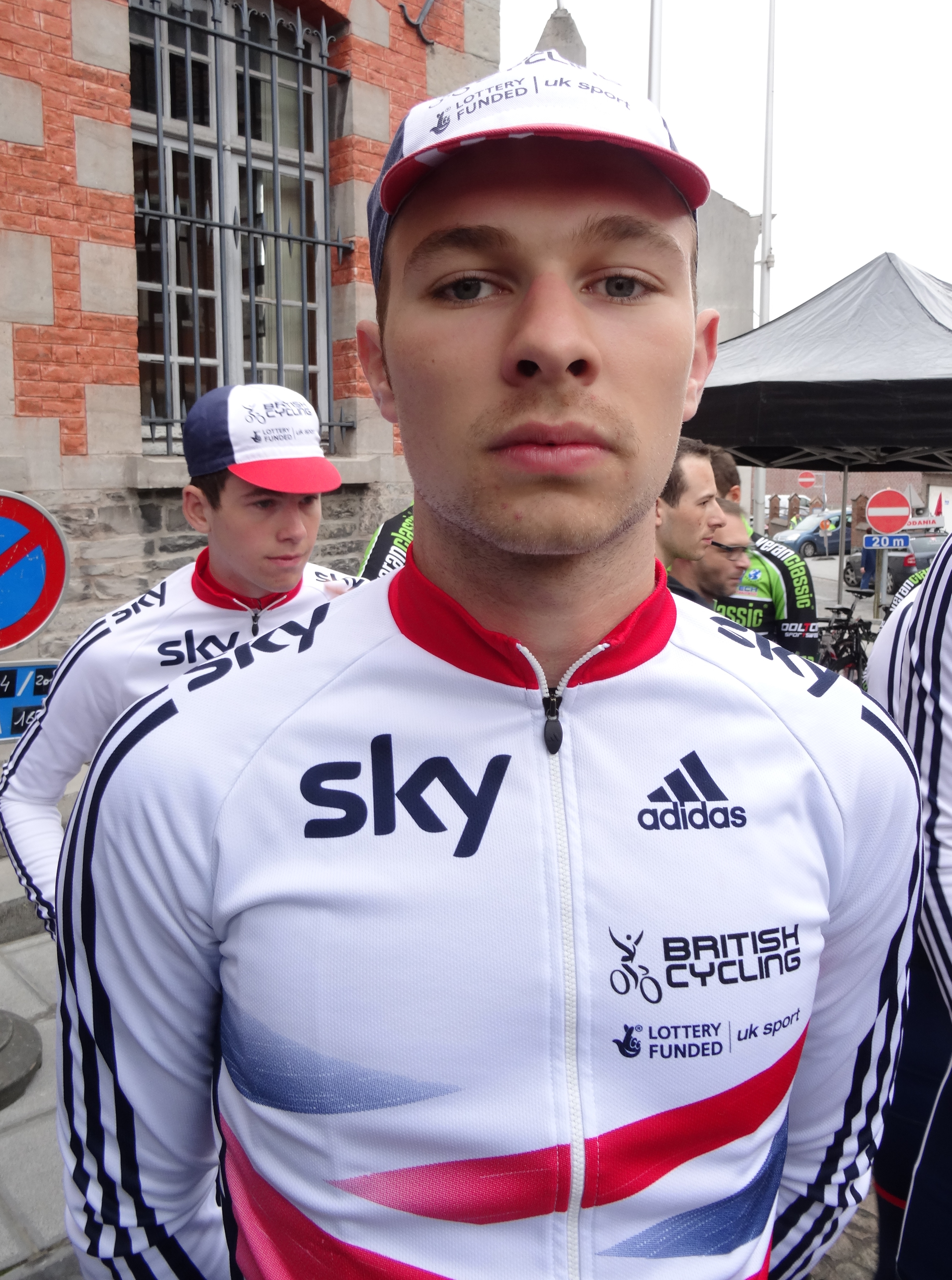 Triptyque des Monts et Châteaux 2014, étape 1, 4 avril 2014, départ d'Antoing. Depicted person: Owain Doull Depicted team: Équipe nationale du Royaume-Uni espoirs The creation of these files was made possible thanks to the organizers of the Triptyque des Monts et Châteaux 2014 English | français | +/−